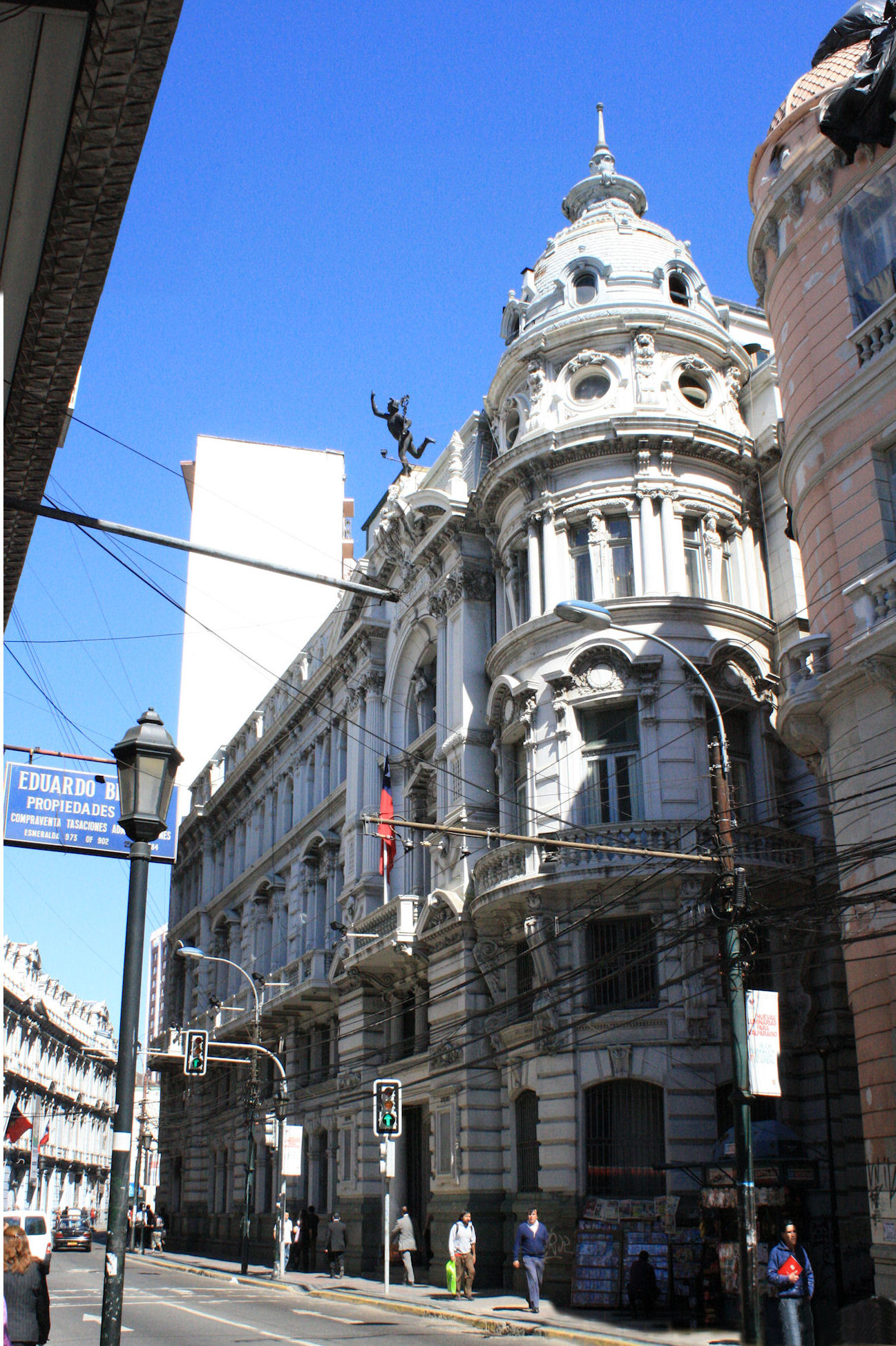 Valparaiso